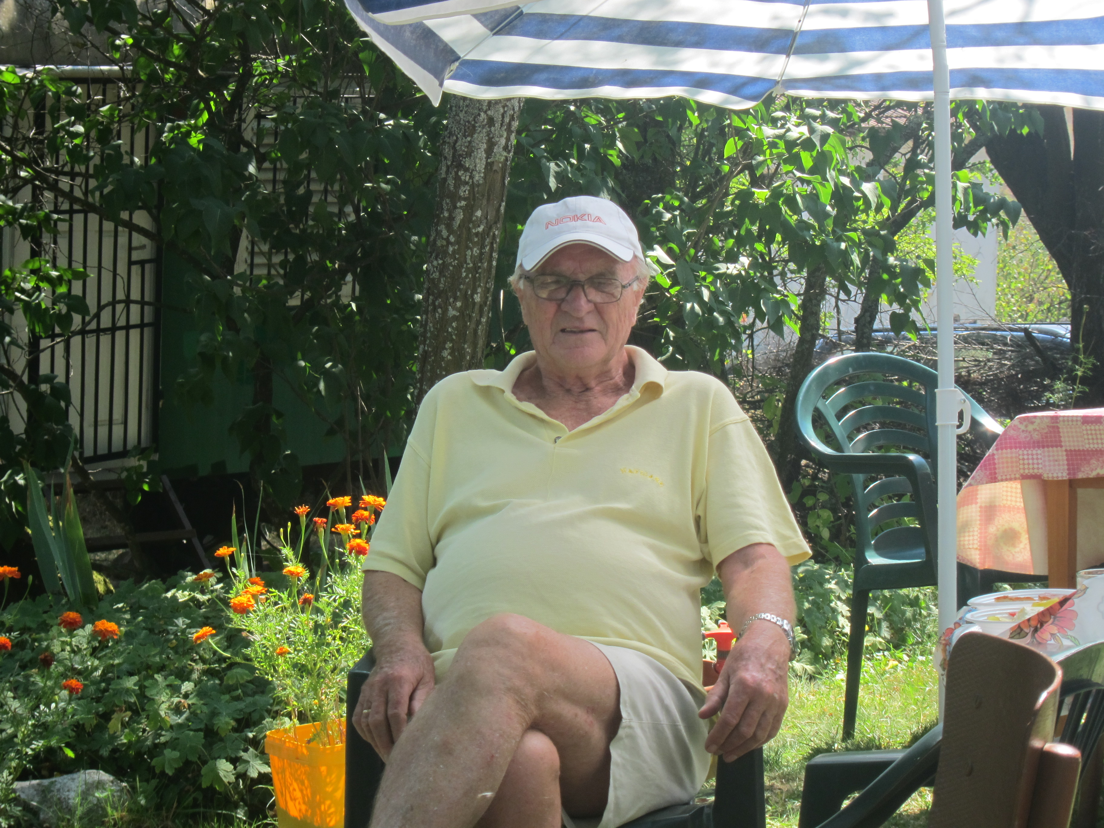 Тодор Симов